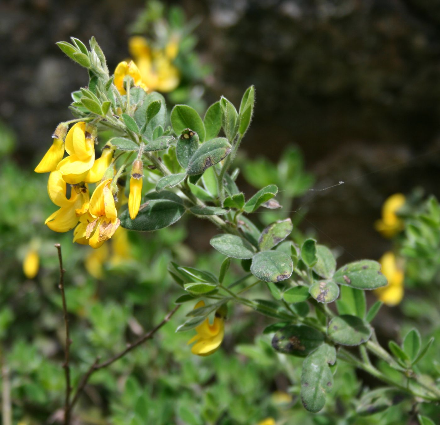 Cytisus villosus, Hülsenfrüchtler (Fabaceae), Schmetterlingsblütler (Faboideae) - Italien/Italia/Italy: Kalabrien/Calabria, Prov. Reggio Calabria, Parco Nazionale dell'Aspromonte, Vallata dell'Amendolea SE Diga del Menta